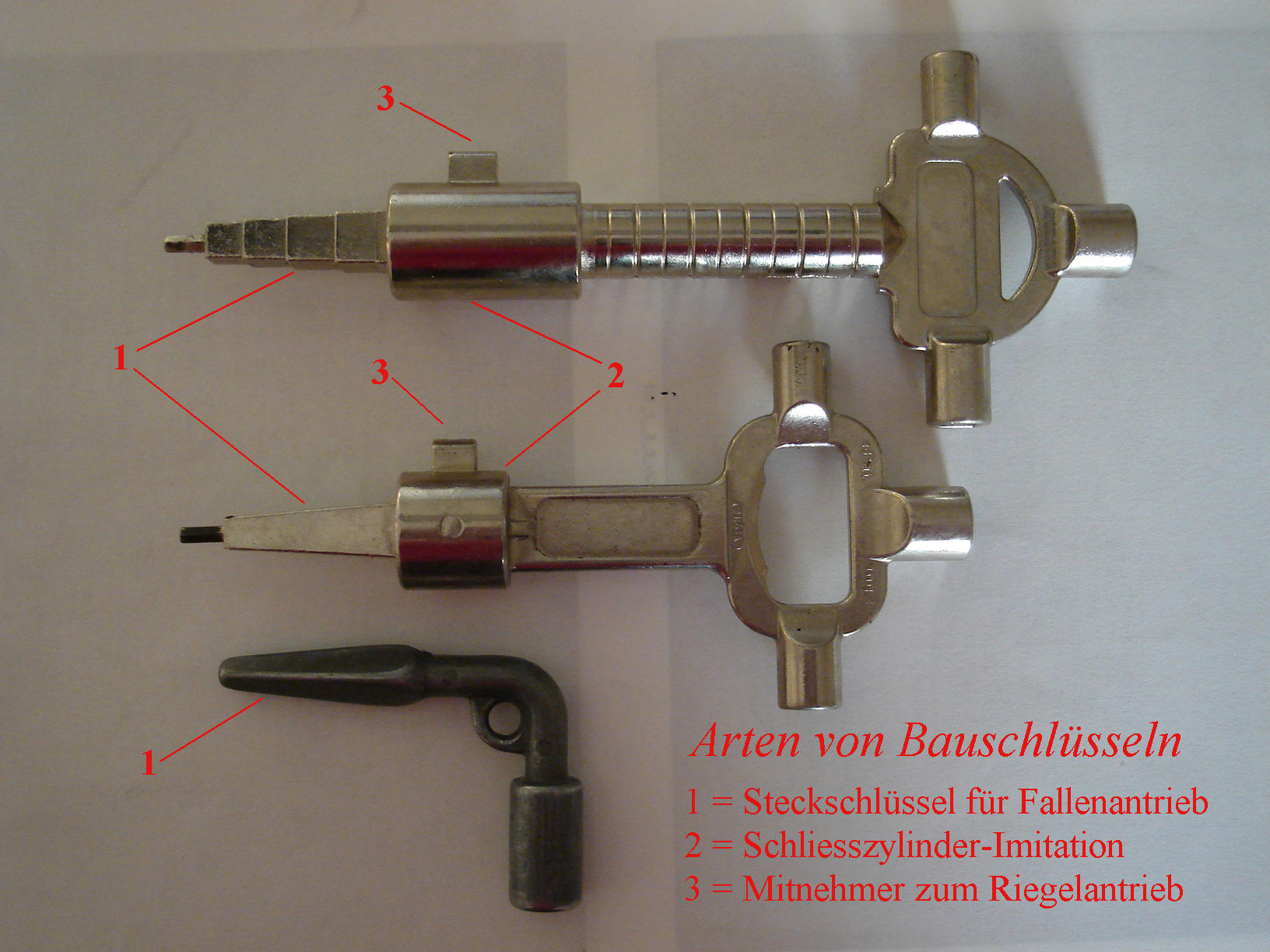 Drei Arten von Bauschlüsseln. Lizenzfreies Bild.